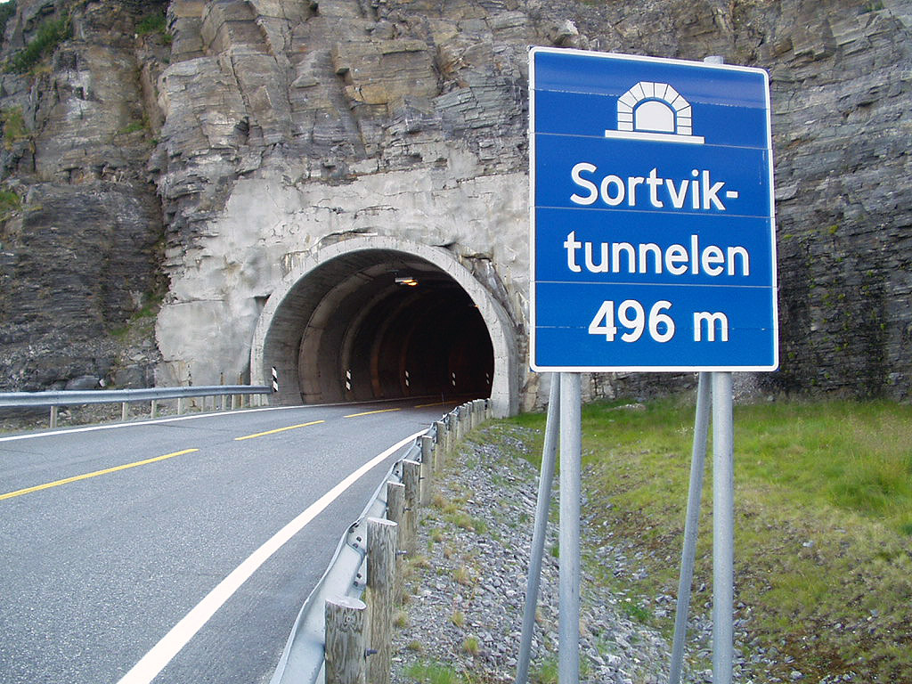 Åpningen på nordsiden av Sortviktunnelen.